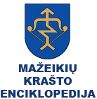 MKE logo